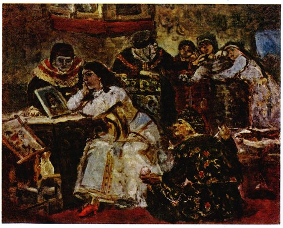 Царевна Ксения Годунова у портрета умершего жениха королевича. Эскиз неосуществлённой картины. 1881 г. Холст, масло. Государственная Третьяковская галерея